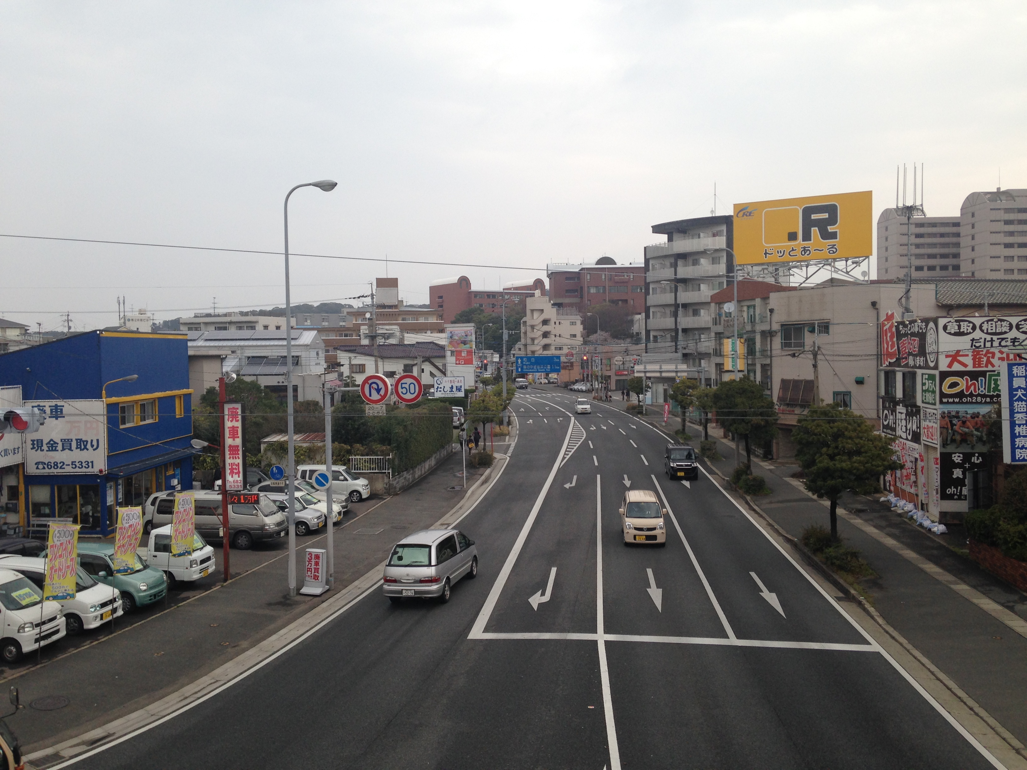 香住ケ丘一丁目歩道橋より望む国道495号(和白方面)